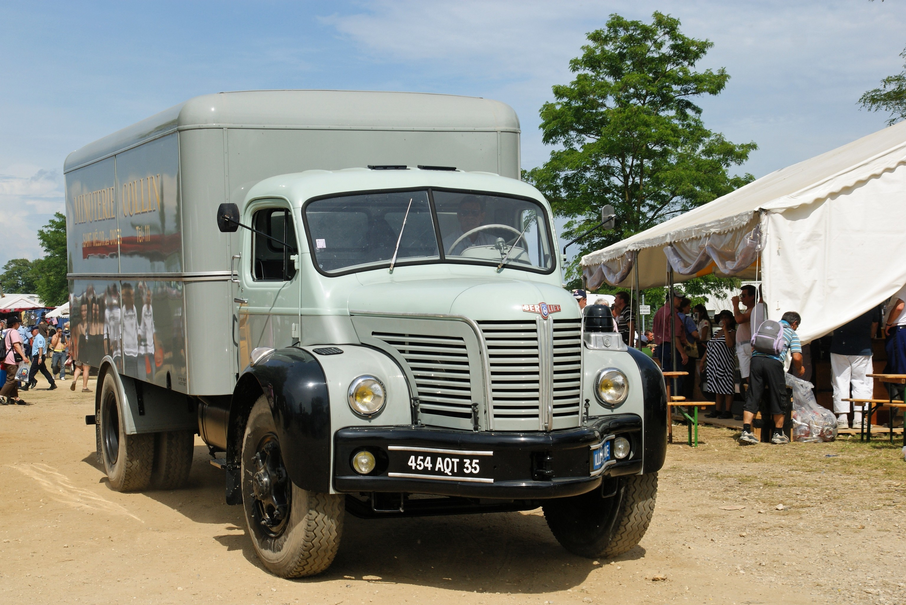 Un BERLIET GLR - camion tout reluisant vu à la Locomotion en Fête 2009.